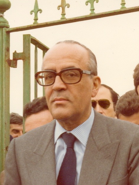 El Excmo. Sr. Don Leopoldo Calvo-Sotelo de visita a El Puerto de Santa María entrando en el Muelle San Ignacio donde atraca el celebre vapor "Adriano III"